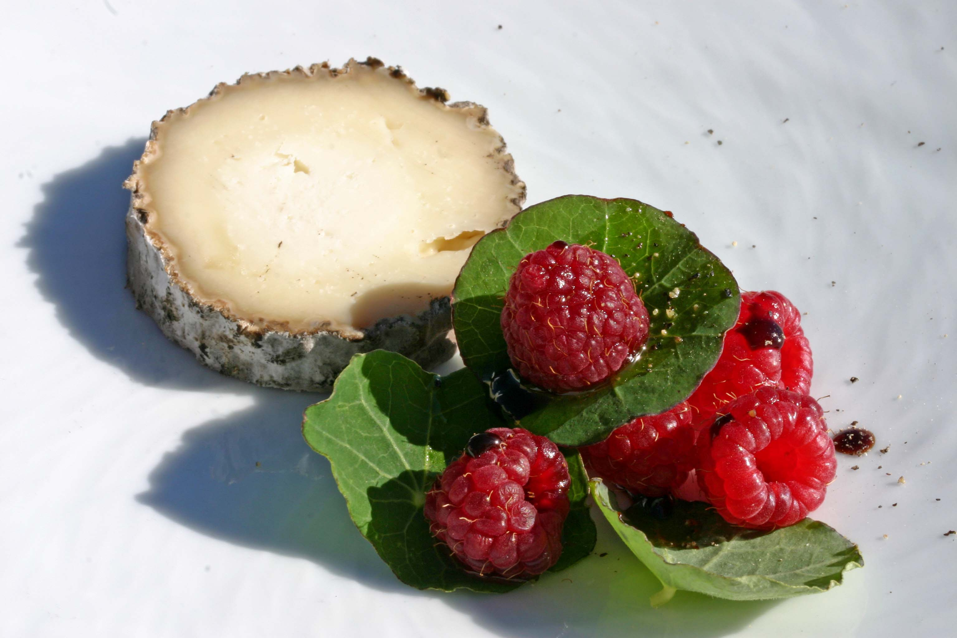 Charollais Fermier Raspberries, nasturtium leaves, juniper balsamic